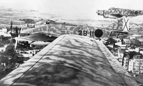 Savoia Marchetti SM..79 P.XI 111 stormo in Spagna